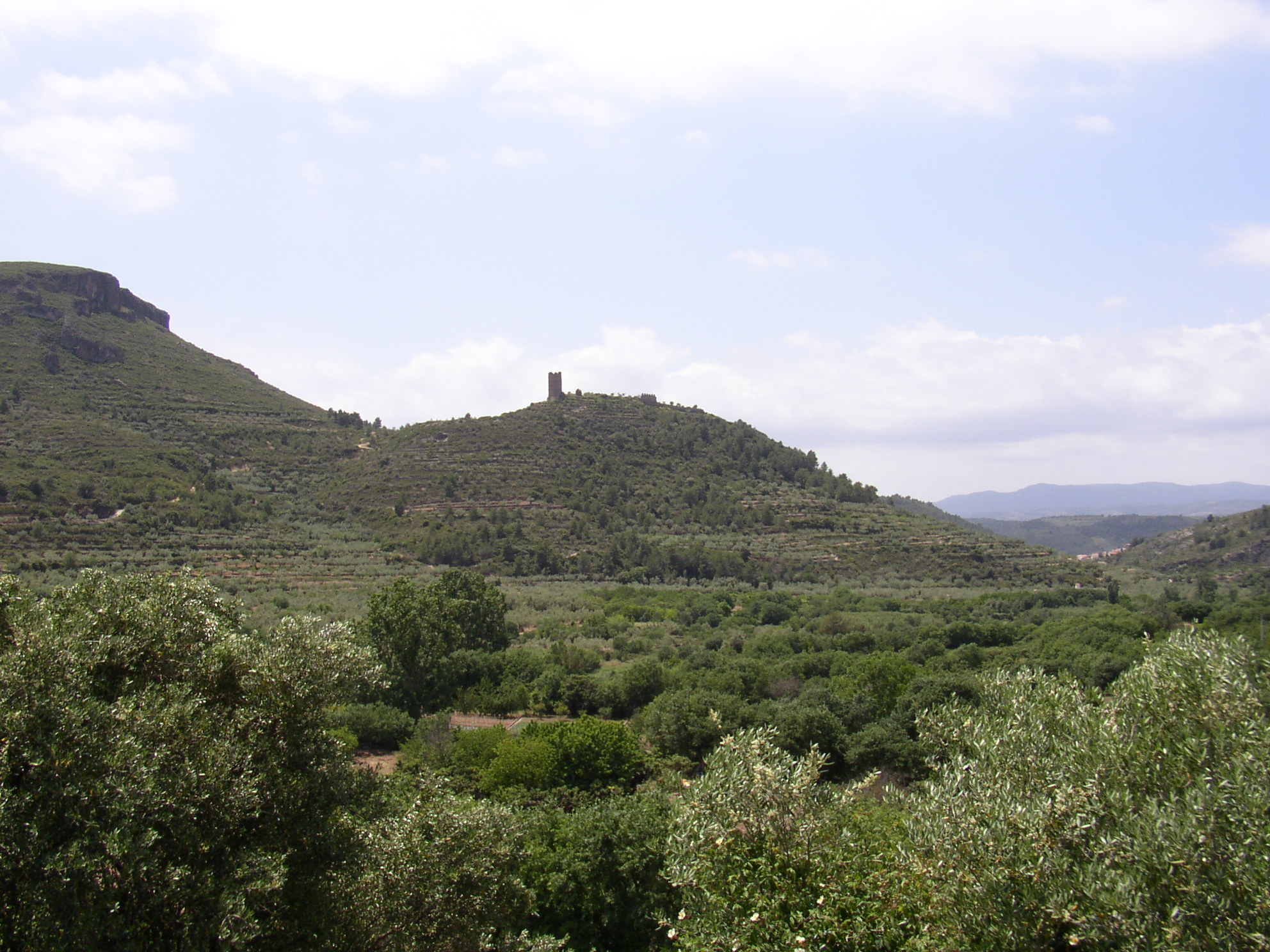 Castellón (Comunidad Valenciana) España. Vall de Almonacid. Castillo de Almonecir.